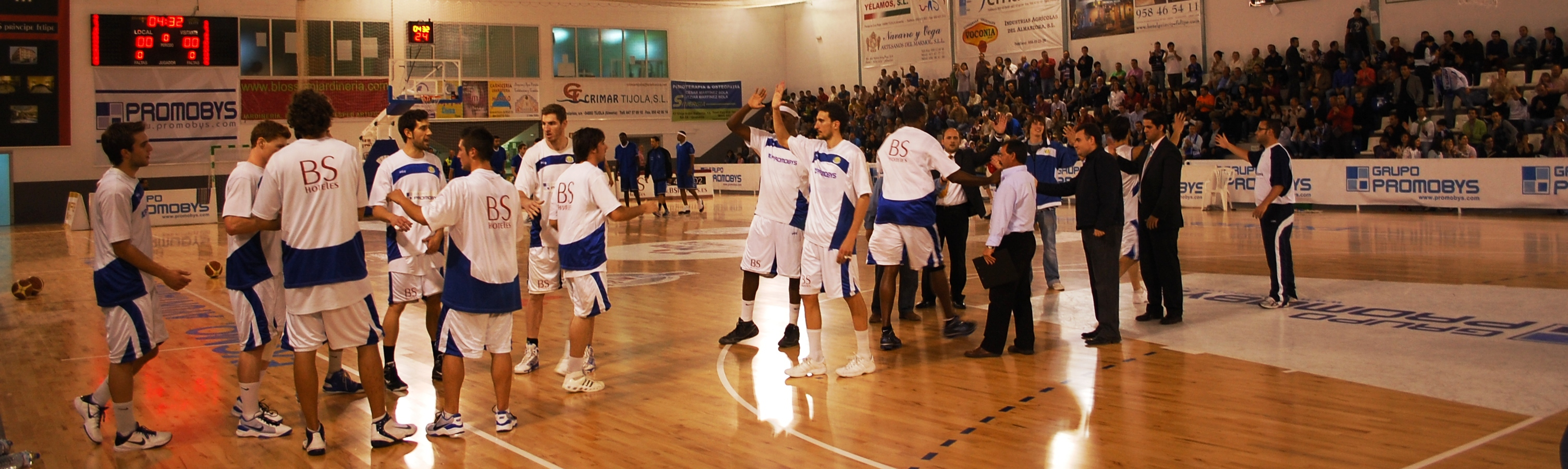 Pabellon Municipal de Tíjoal durante un parrtido de baloncesto